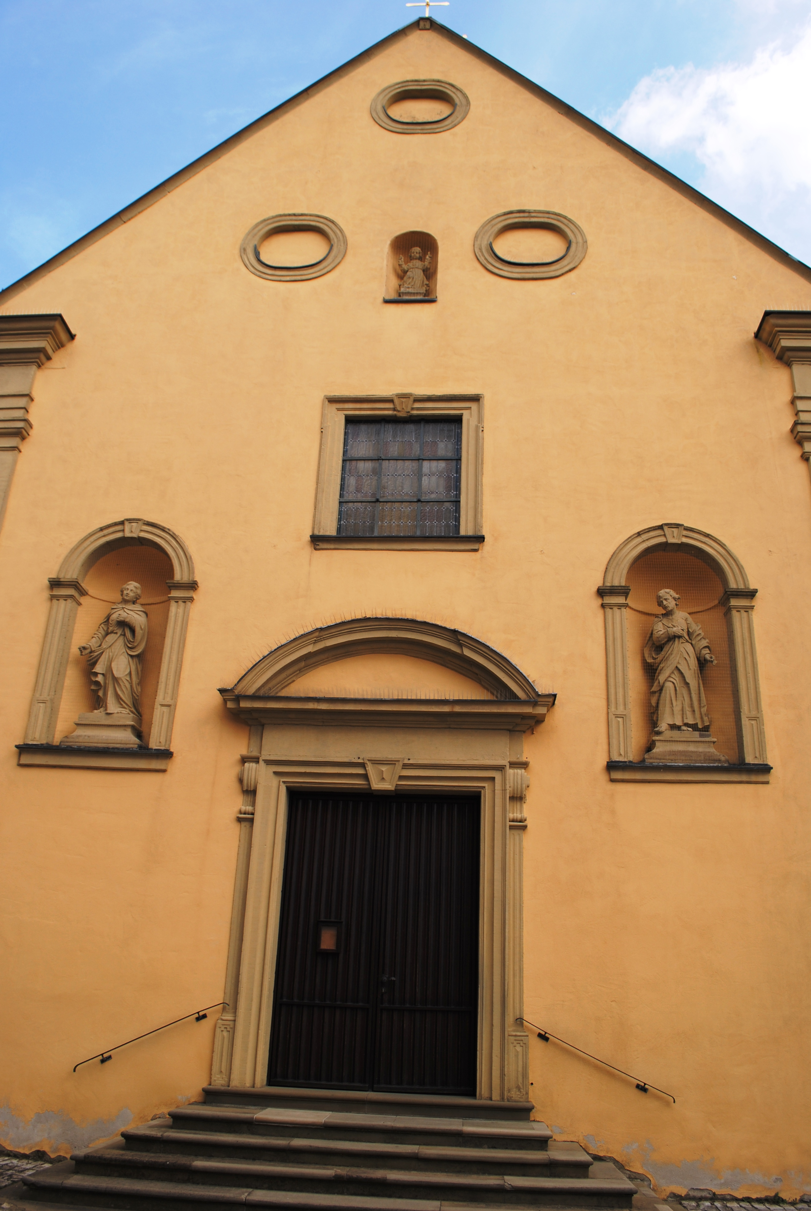 Front, Kirche, Fahr